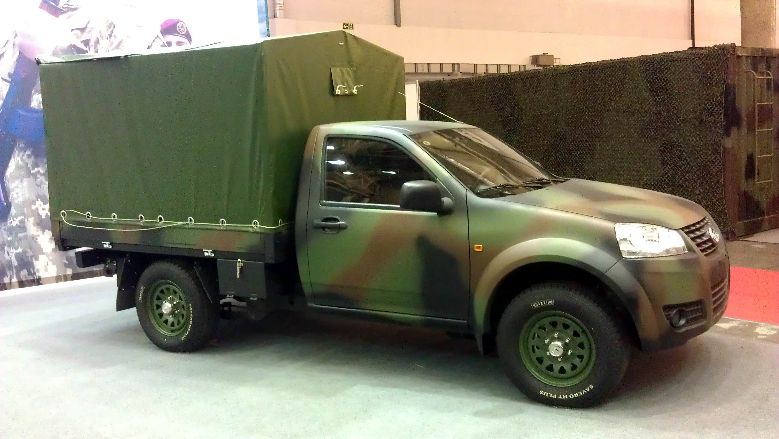 Легкий армейский грузовик на шасси Great Wall Wingle 5 на стенде корпорации "Богдан". Выставка "Зброя та безпека", Киев, сентябрь 2015 г.